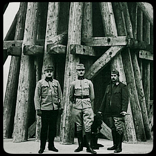 Oblt Tarbuk awarded EK I. in Zemun/Beograd